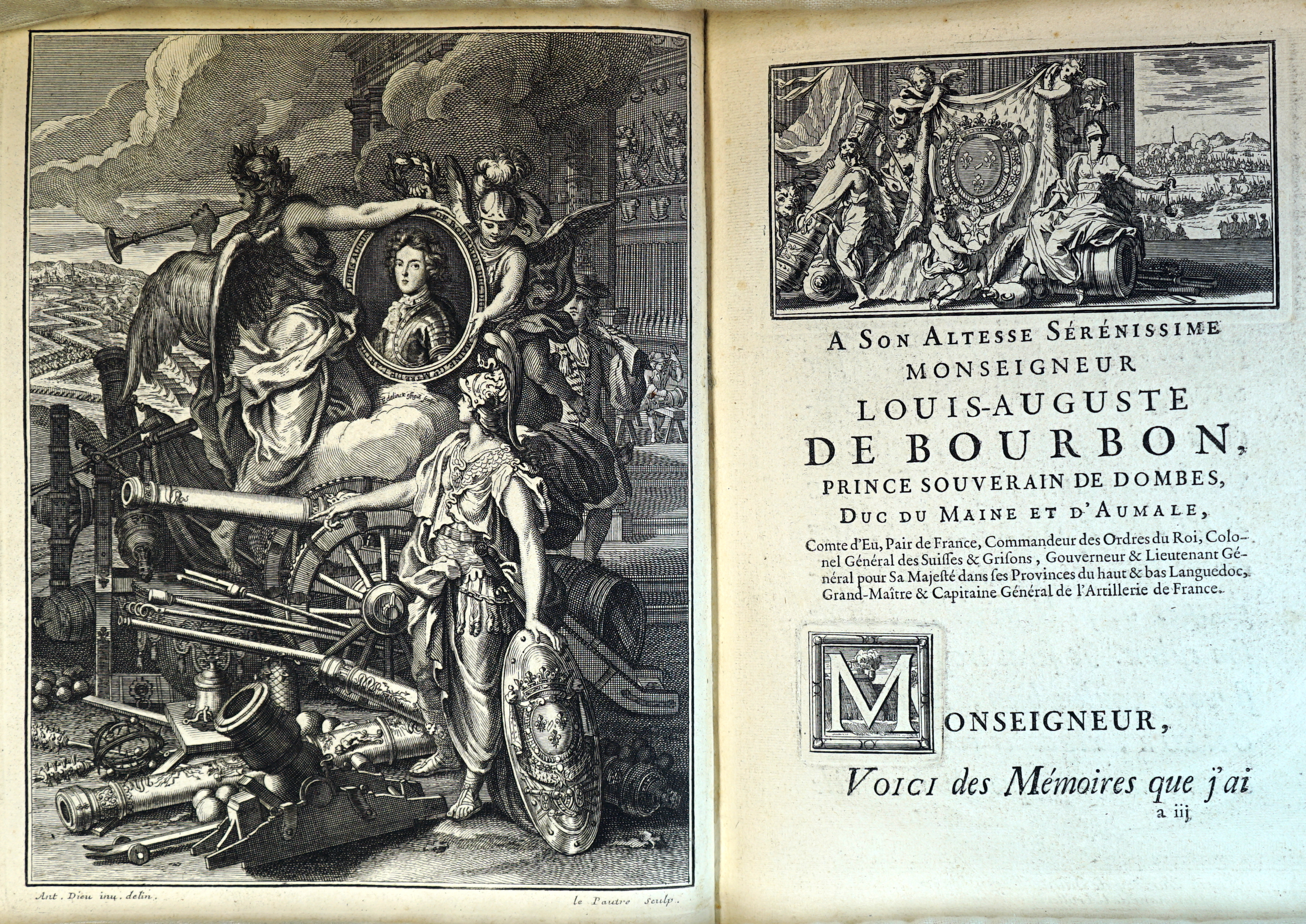 Mémoires d'artillerie, recueillis par M. Surirey de Saint Remy, exemplaire de la B.M. de Reims, troisième édition. Gravure de Lepautre et Edelinck dessin de Antoine Dieu